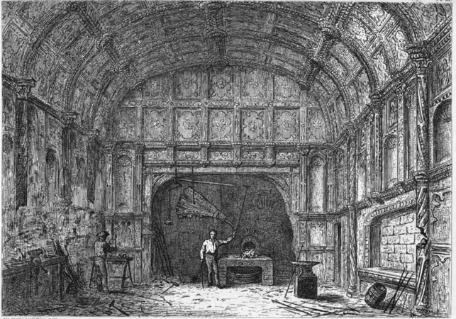 Dessin de l'intérieur de la chapelle Saint-Thomas, collégiale Notre-Dame de Nantes, France, réalisé au début du XIXe sècle